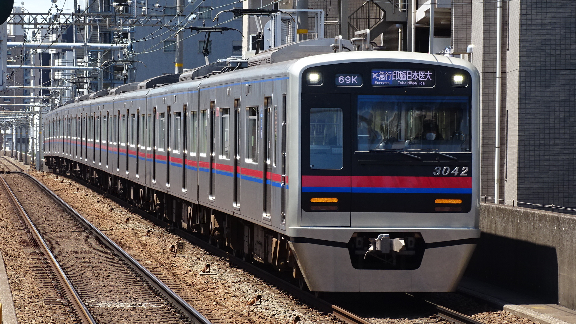 令和2年6月10日、立会川駅にて撮影 Sony Cyber-shot DSC-HX400V